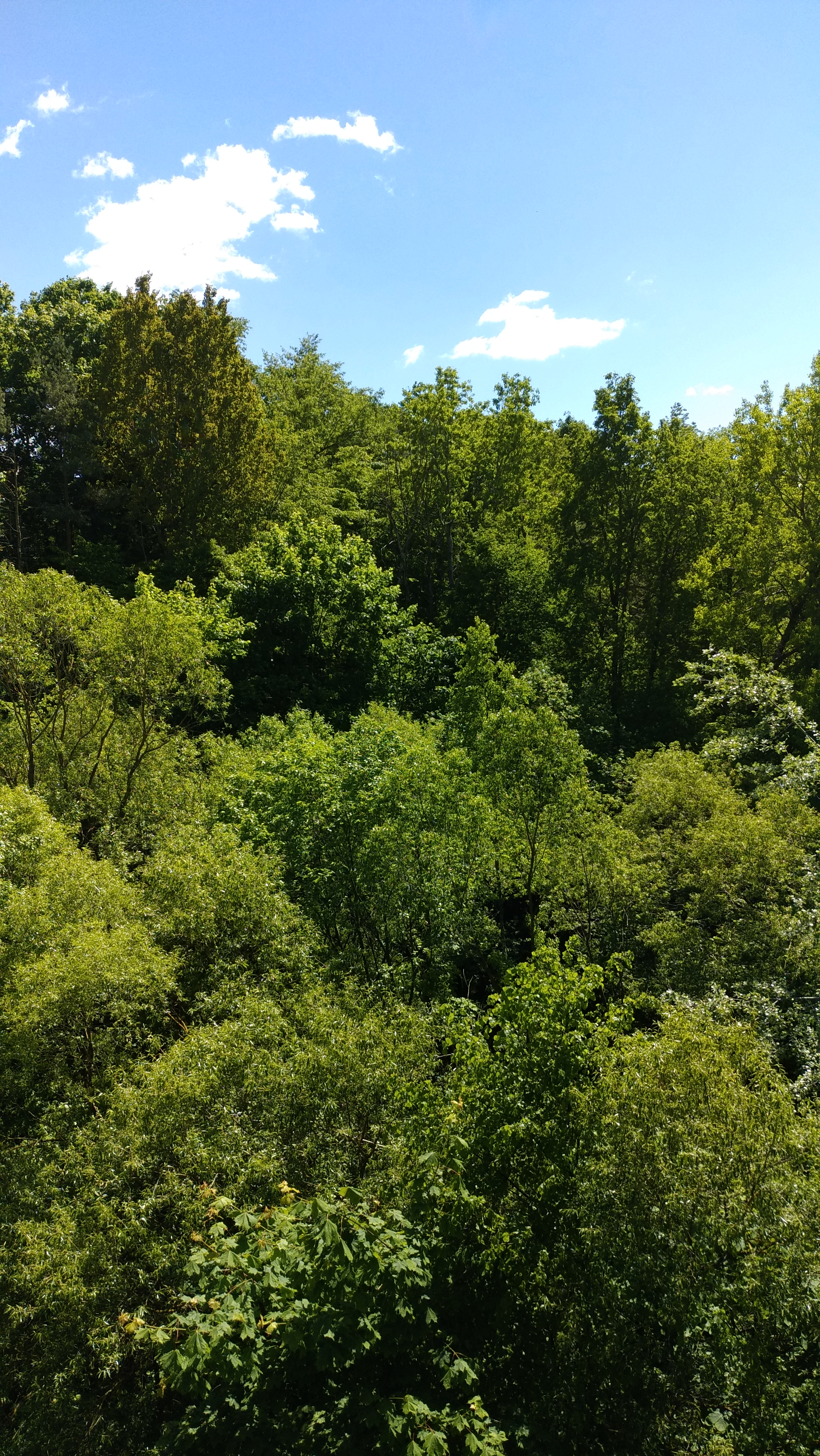 Беларуская (тарашкевіца): Лес на схіле Фамічоўскага яру ў Румлёве